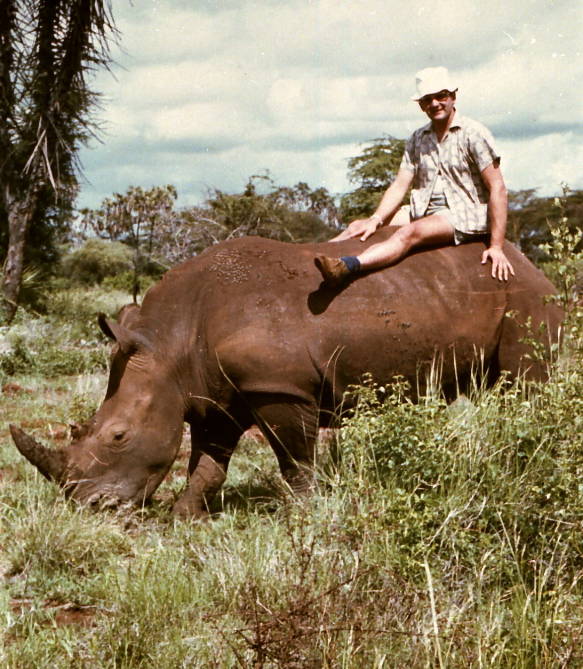 КЕНИЯ. Национальный парк Меру. Носороги совсем не склонны к общению с людьми и, поэтому. я советую не приближаться к ним без серьёзной подстраховки.